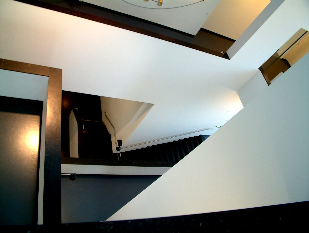 De architectuur van eht van Abbemuseum in Eindhoven is al een kunstwerk op zich